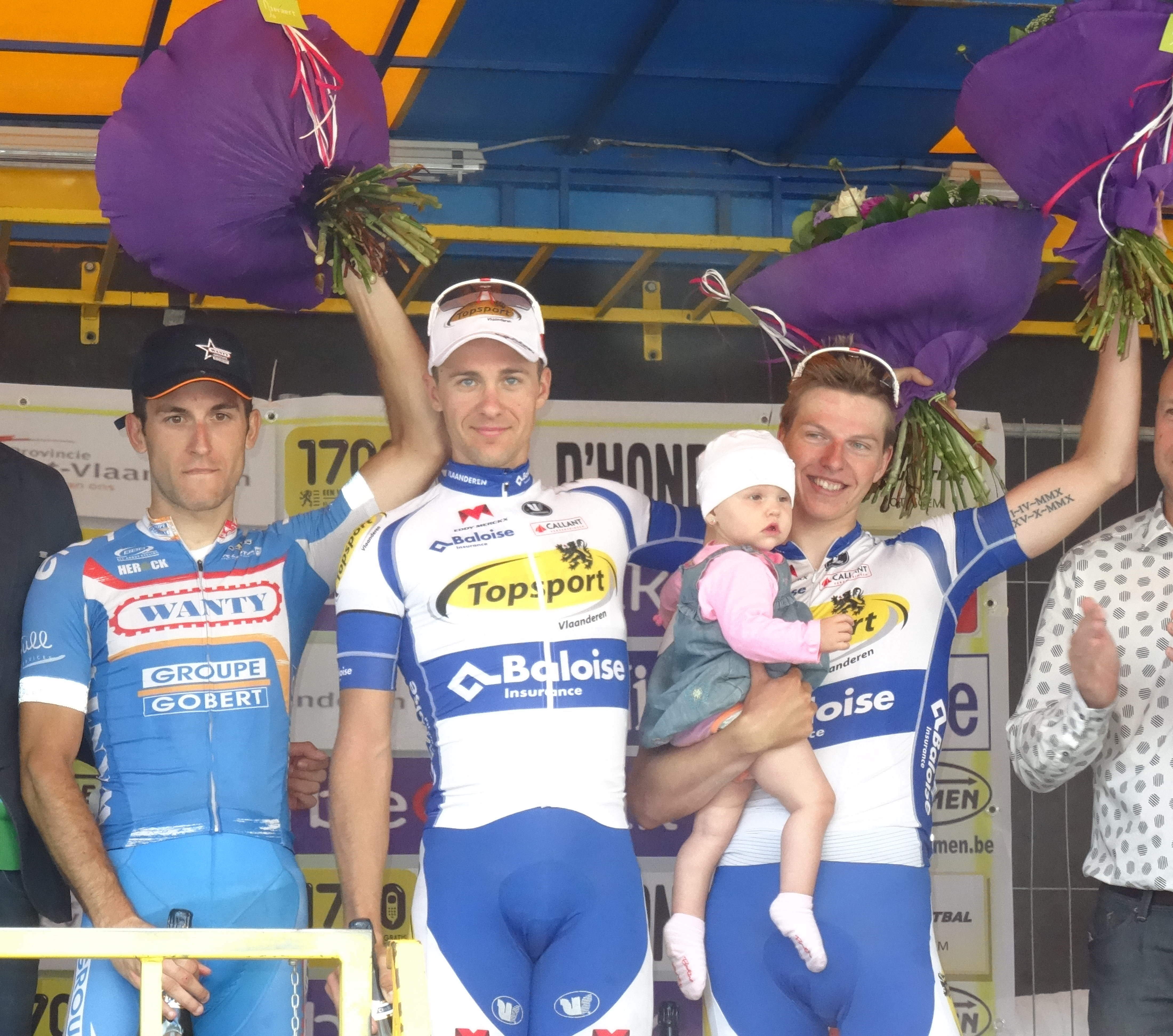 Reportage photographique réalisé le mardi 19 août à l'occasion du départ et de l'arrivée du Grand Prix de la ville de Zottegem 2014 à Zottegem, Belgique.